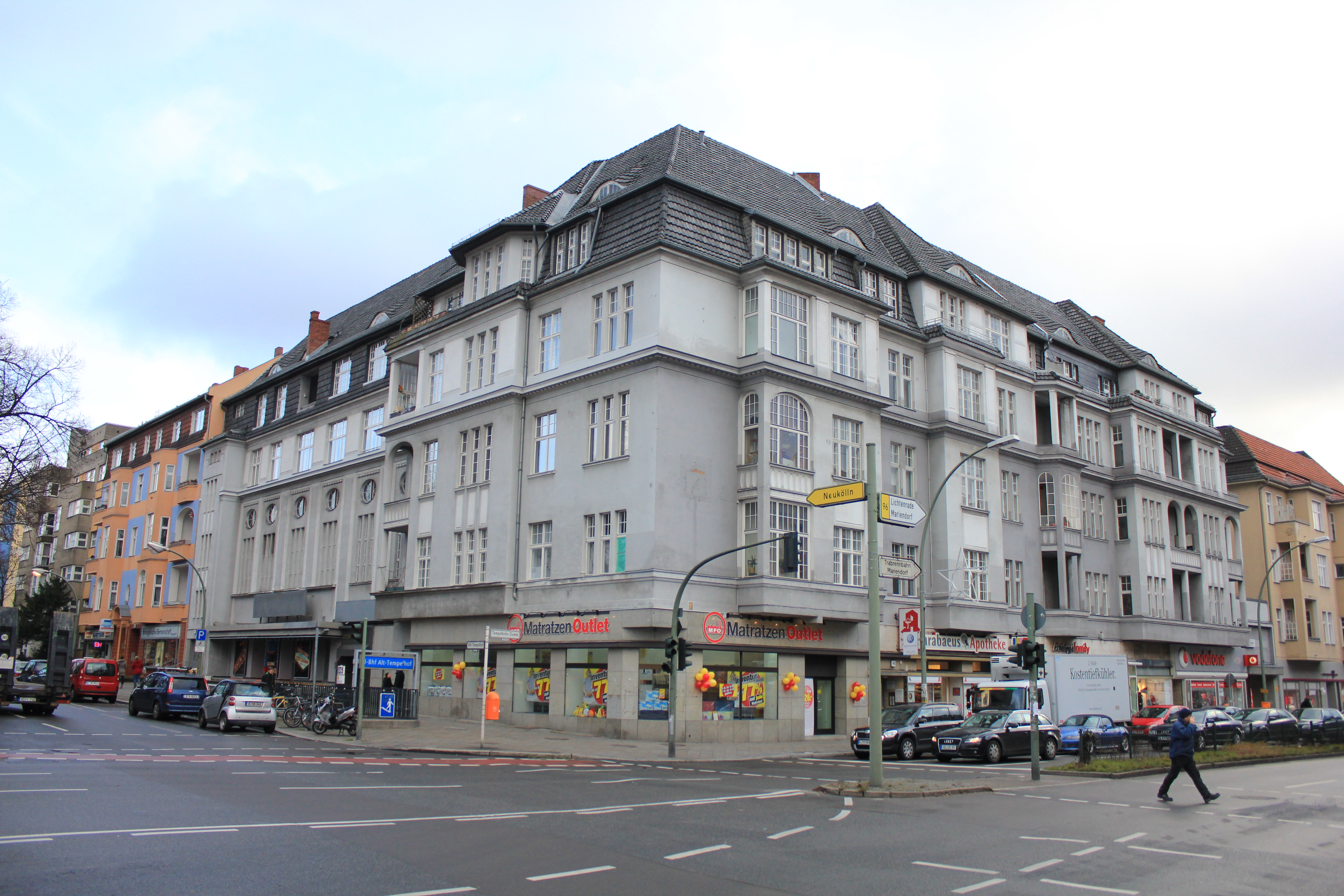 Wohn- und Geschäftshaus "Zum Kurfürst" 1911-12 von Carl und Emil Schneider